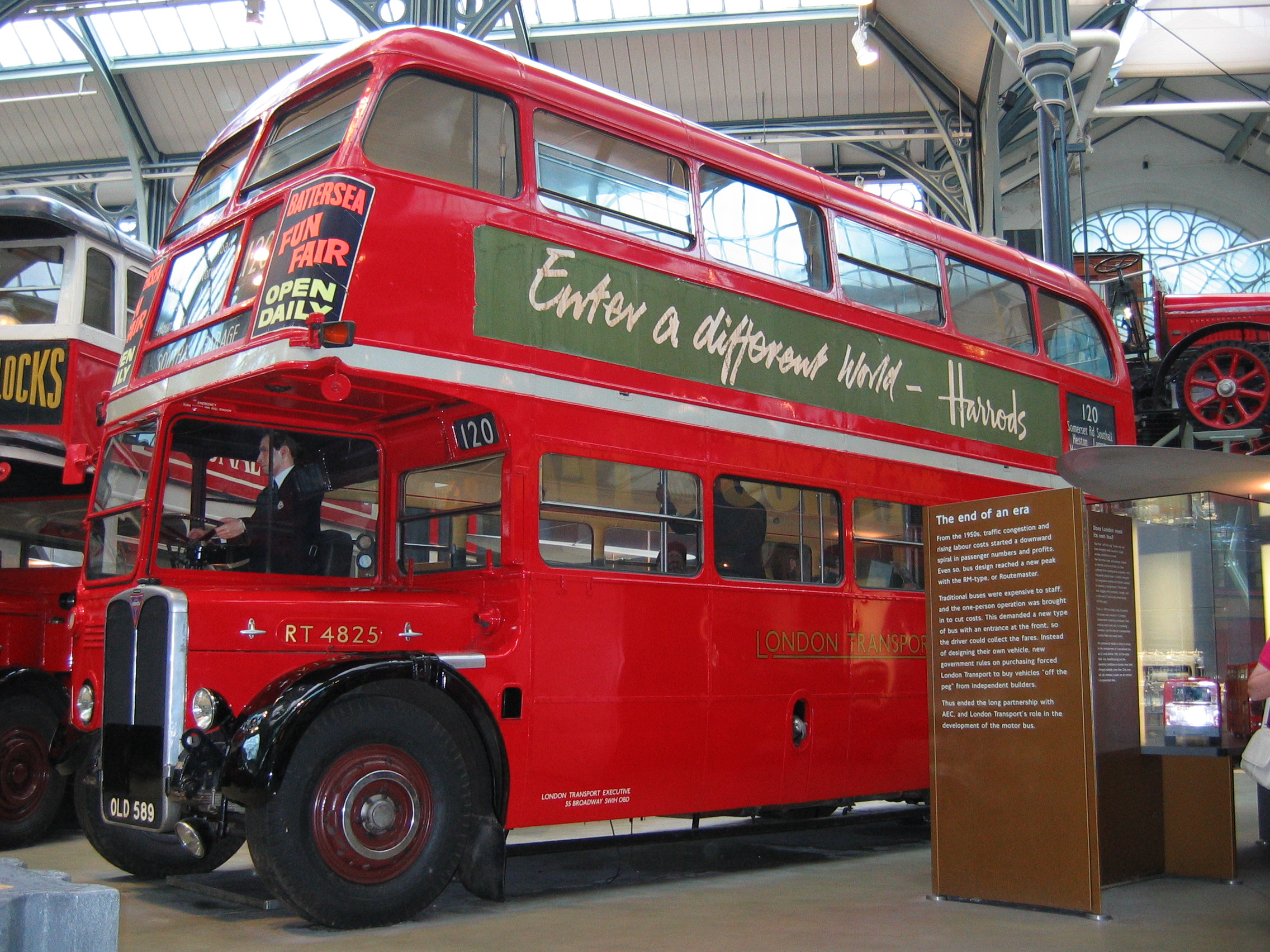 AEC Regent III RT